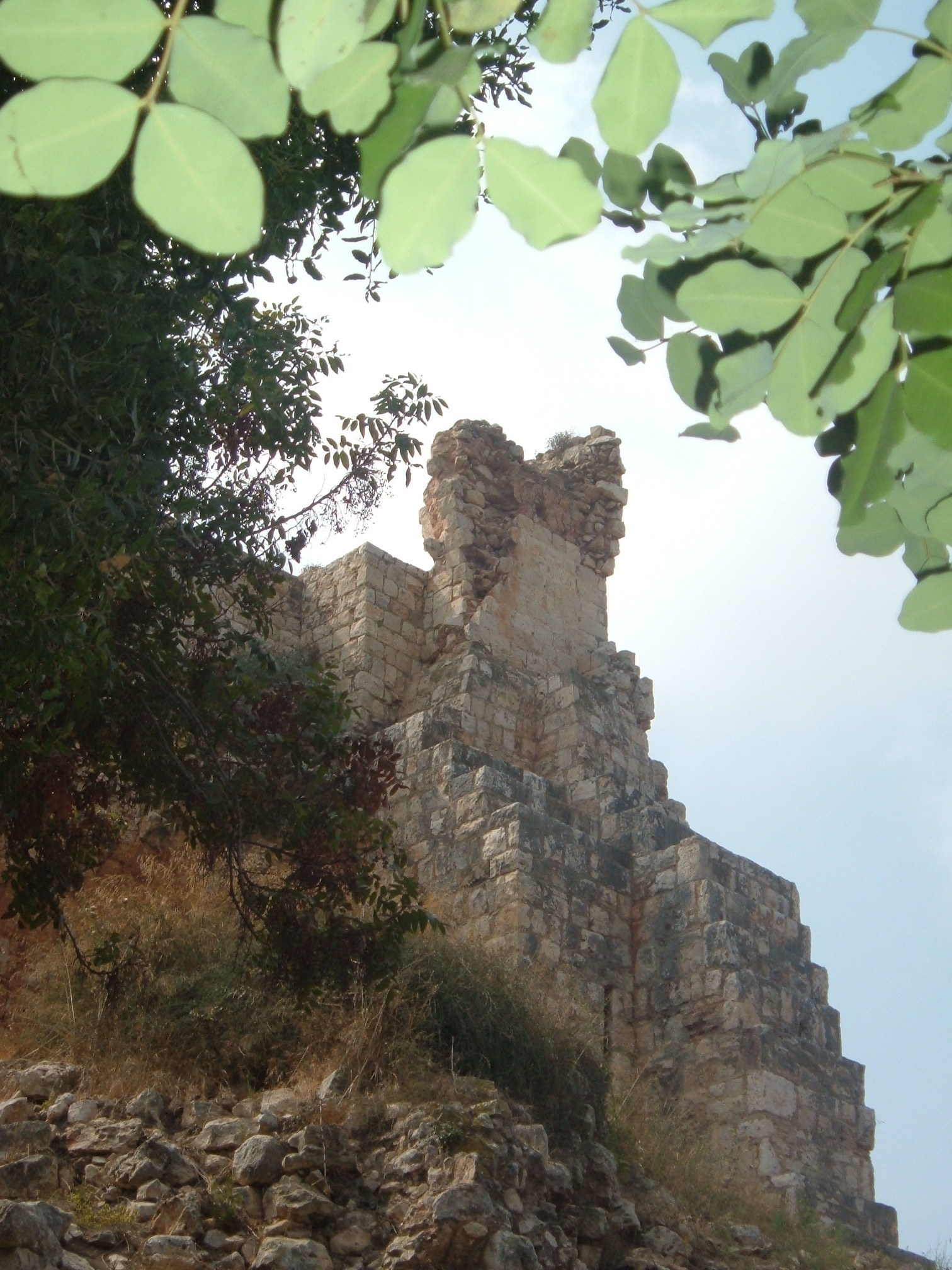 A tower in Mivtzar Yechiam, Israel. מגדל במצודת יחיעם, נבנתה ע"י דהאר מחדש על יסודות המבצר הצלבני